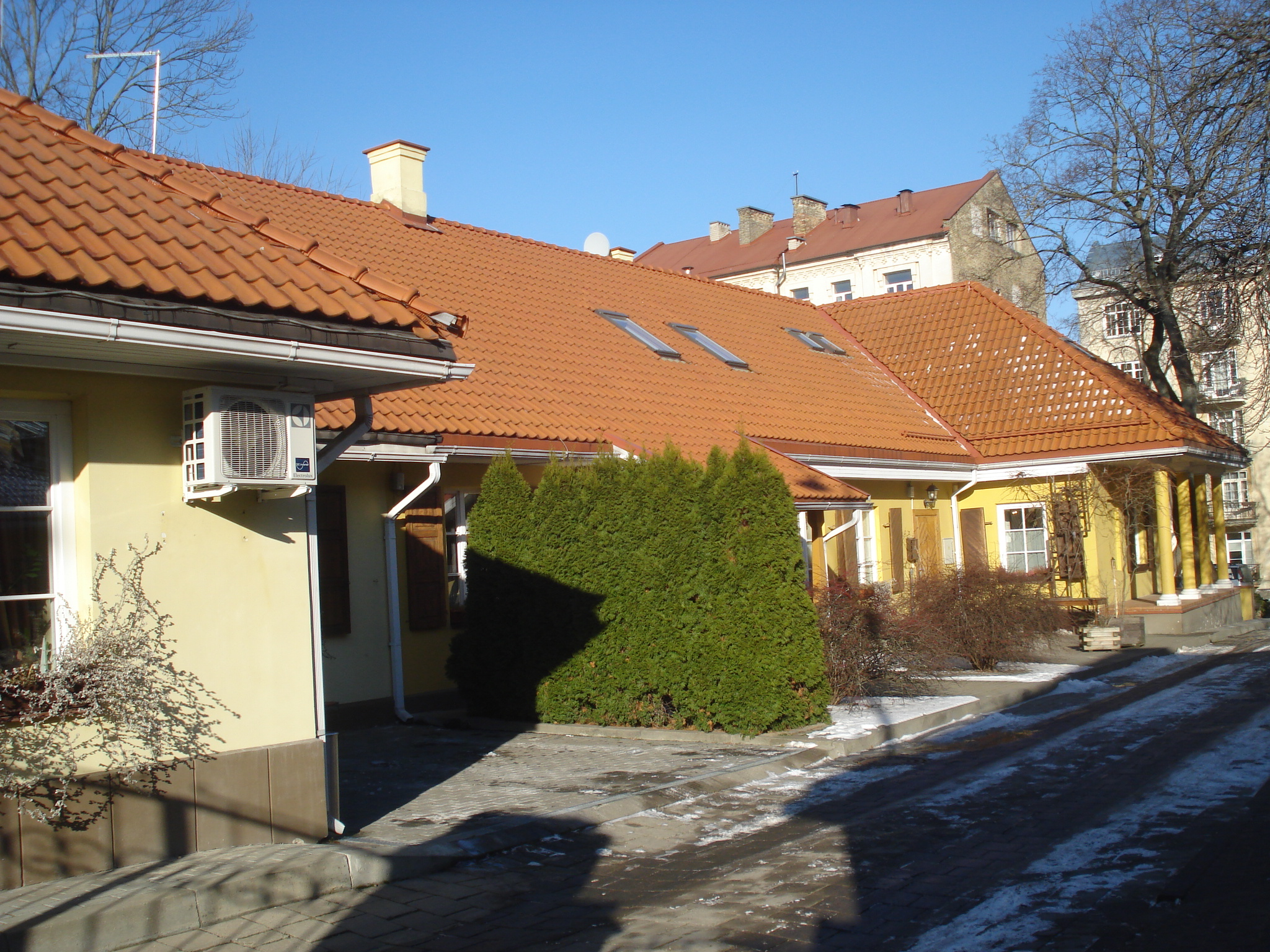 Ансамбль одноэтажных домов в стиле позднего классицизма улица Тилто 3, Вильнюс